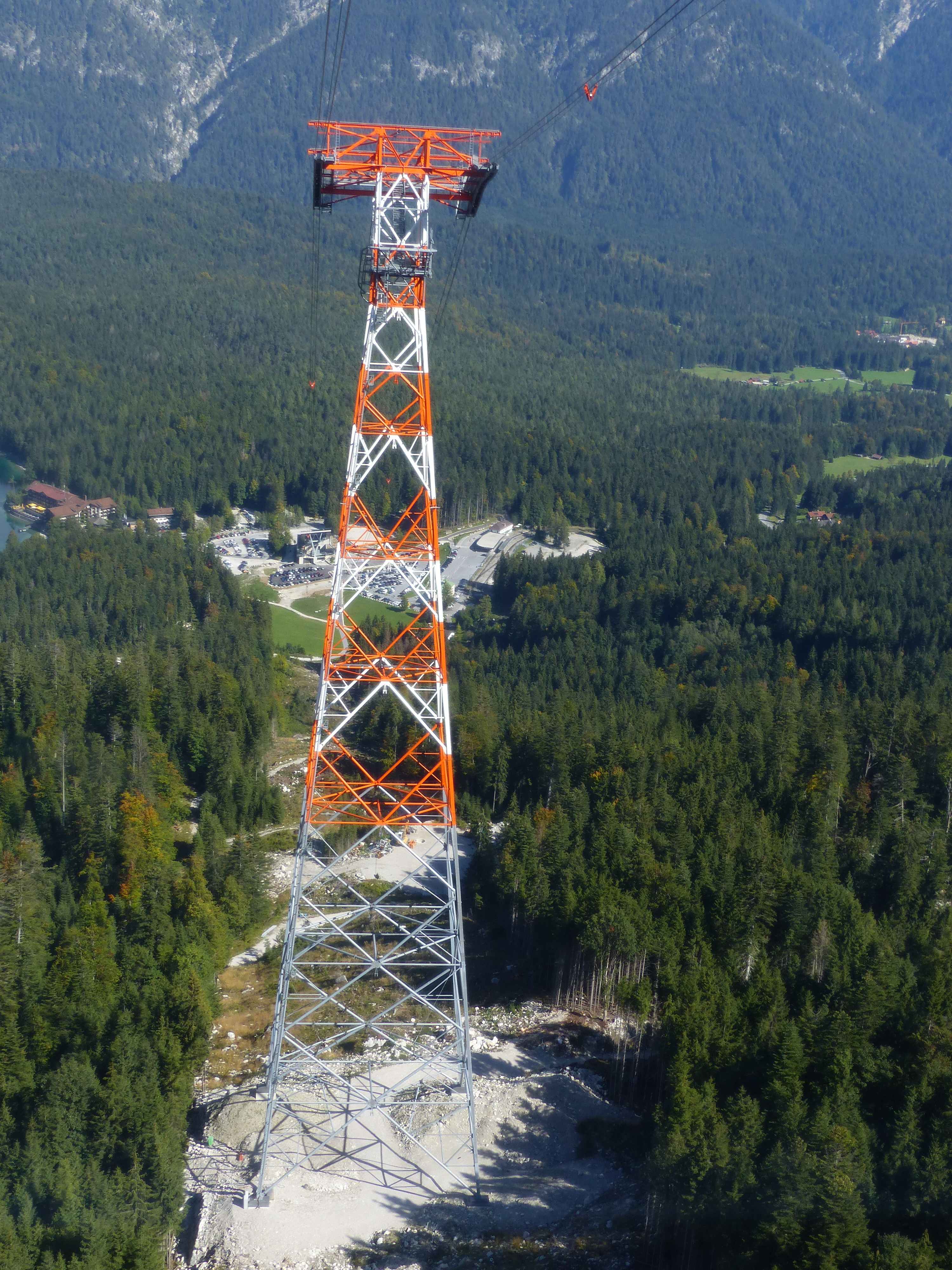 127 m hohe Seilbahnstütze der Eibseebahn (Seilbahn Zugspitze). Im Hintergrund der Bahnhof Eibsee der Bayrischen Zugspitzbahn.